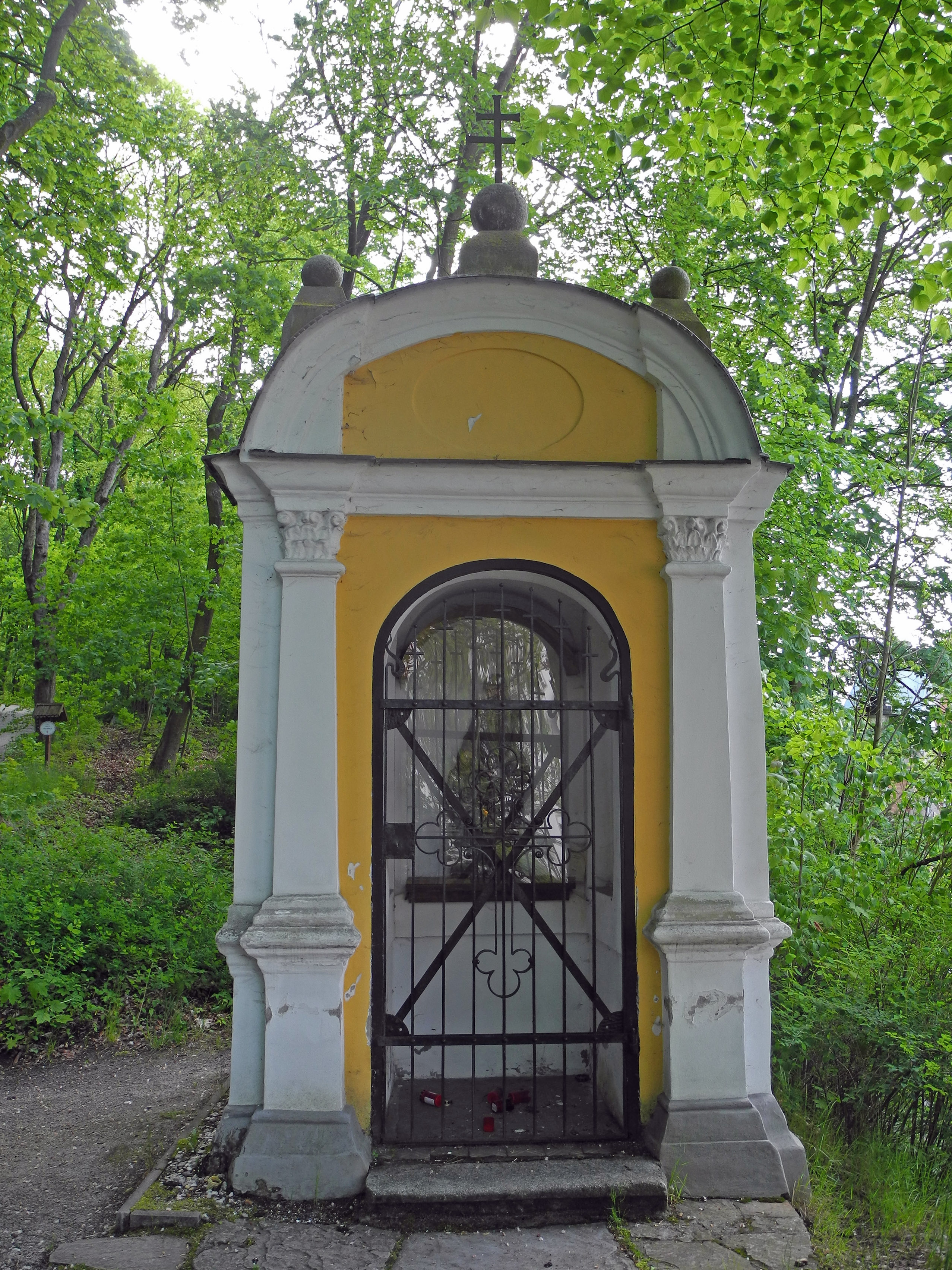 Annenkapelle in Karlsbad (Karlovy Vary)